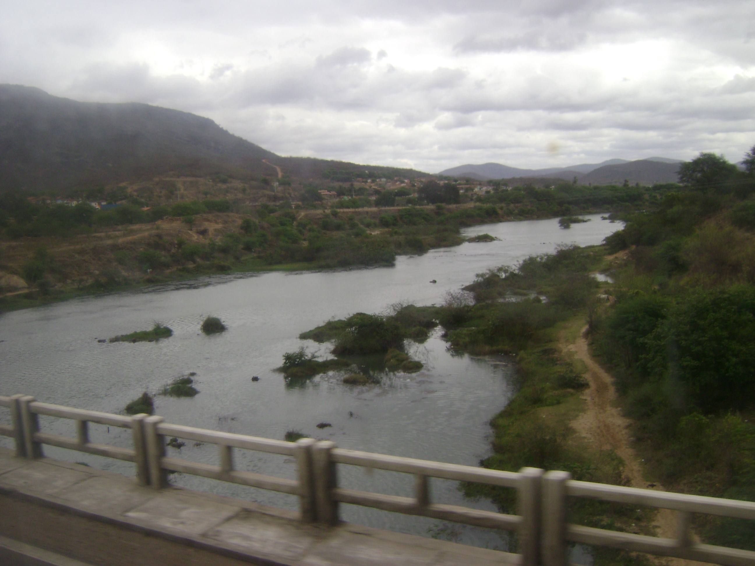 Rio em Jequié, Bahia, Brasil.